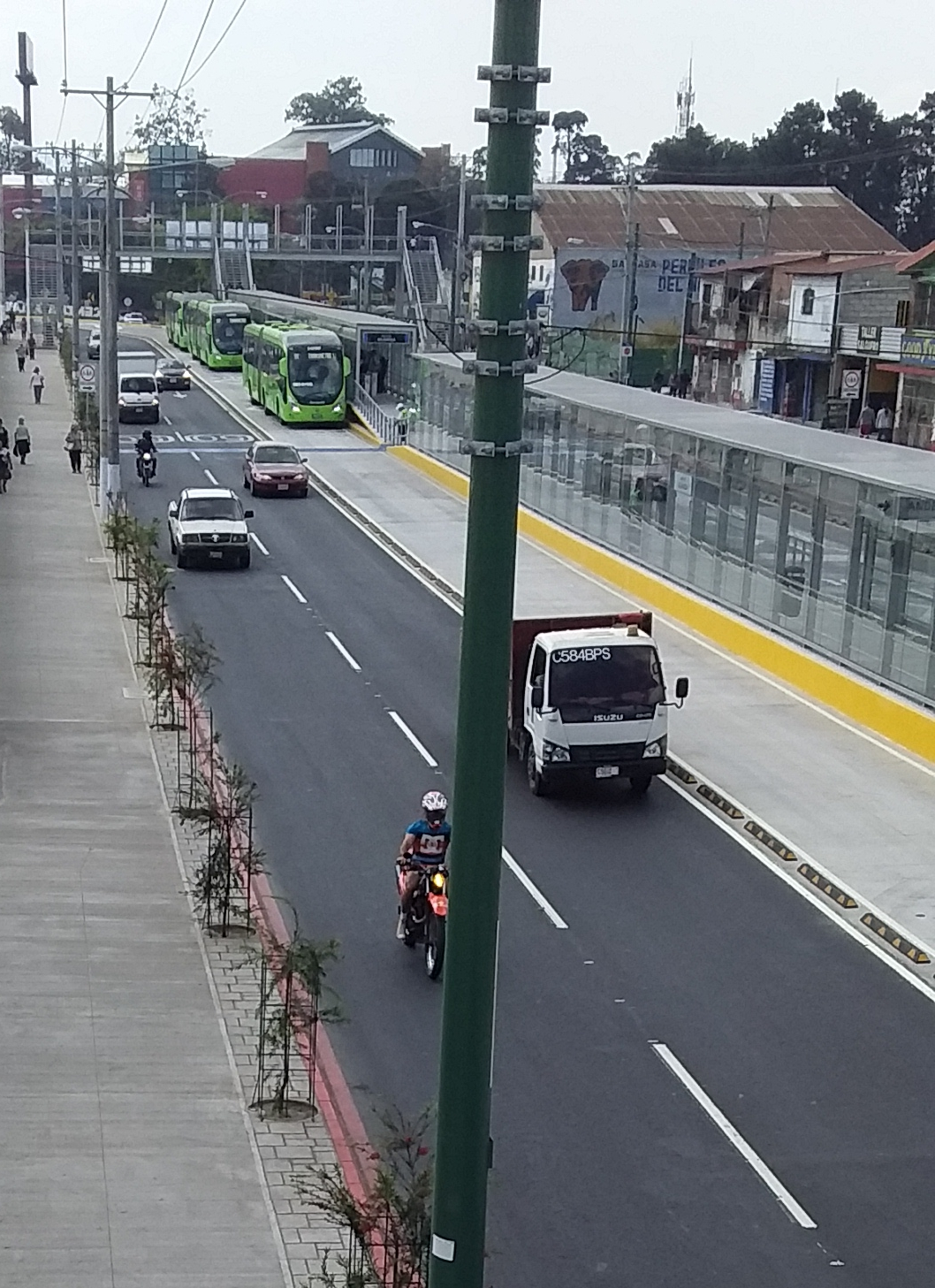 Central de autobuses, Transurbano y Transmetro